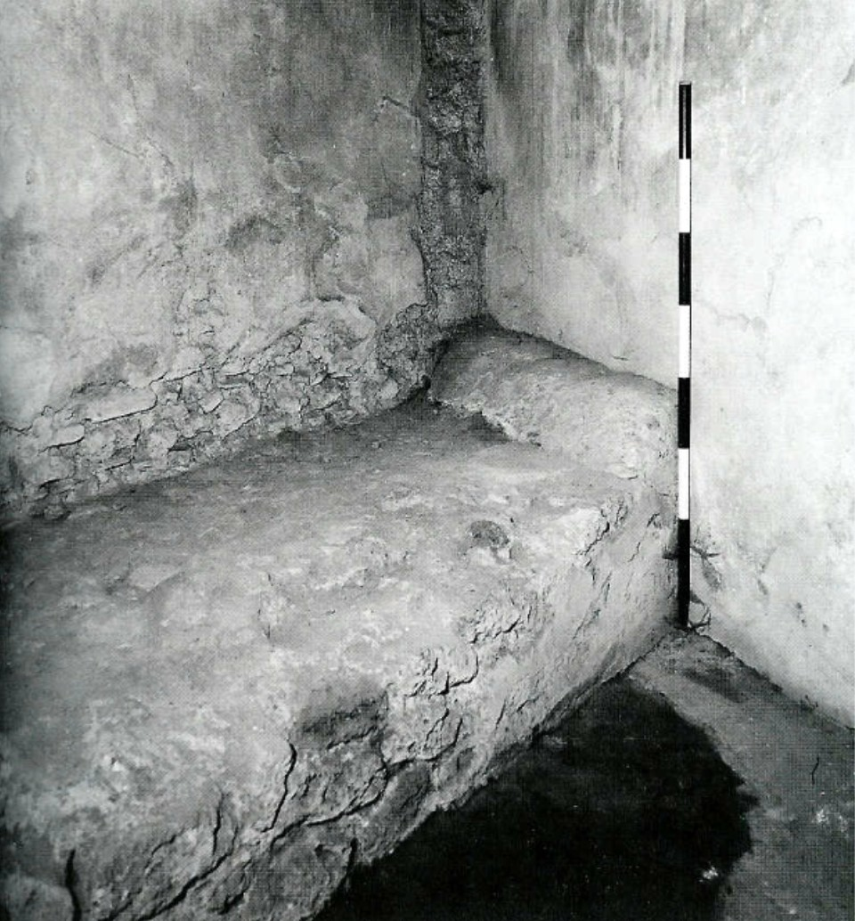 Habitación privada de un lupanar en Pompeya